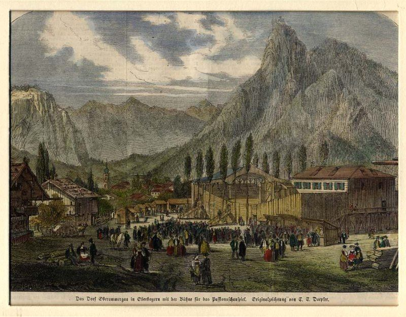 Das Dorf Oberammergau in Bayern mit der Bühne für das Passionsschauspiel, kolorierter Holzschnitt nach C. E. Doepler, 16 x 22 cm